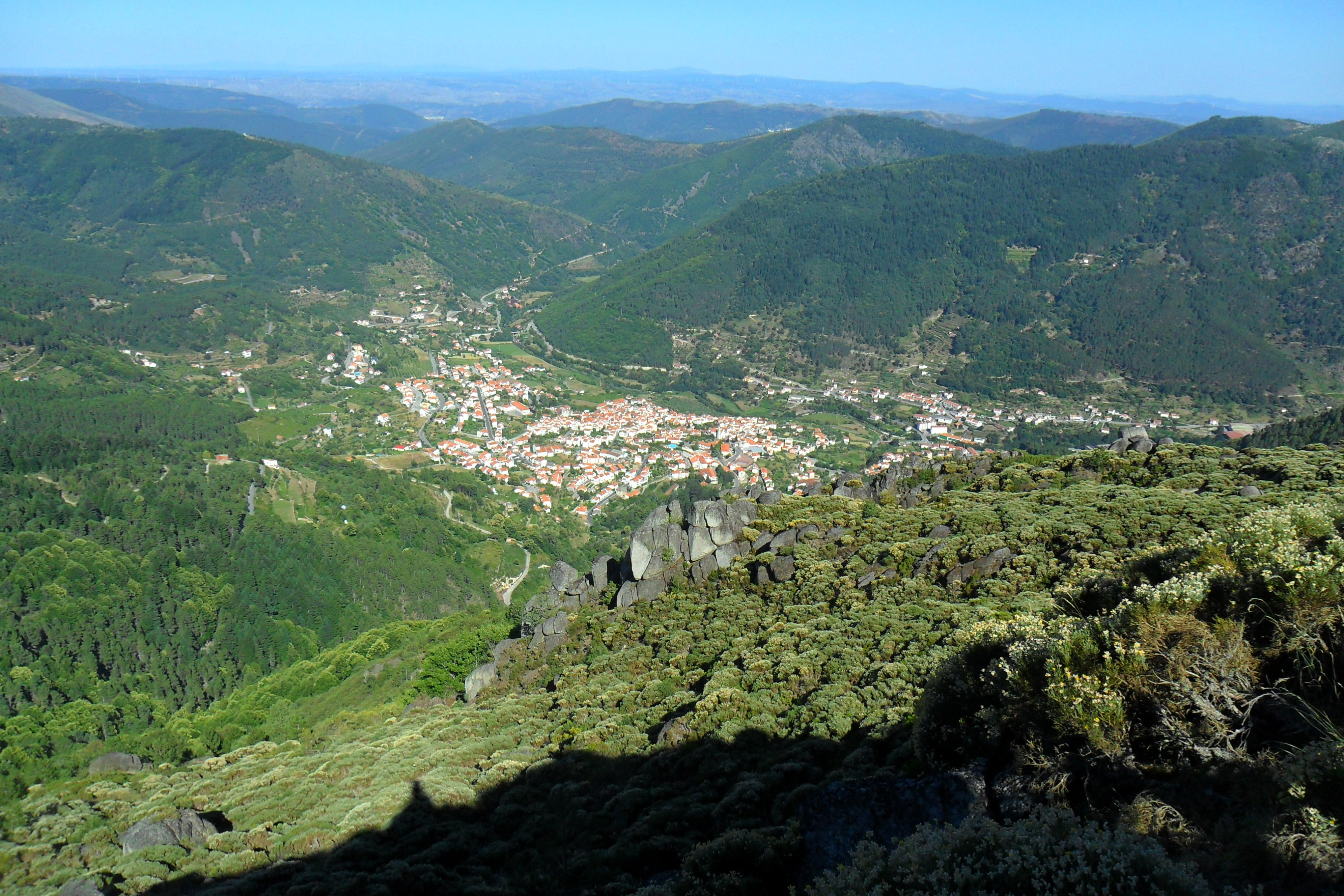 Serra da estrela perto de Manteigas durante o Verão This is a photography of a Site of Community Importance in Portugal with the ID: PTCON0014. Natura2000 entry, EEA entry